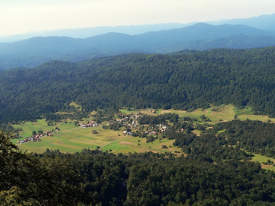 Musulinski Potok, slikano sa Kleka